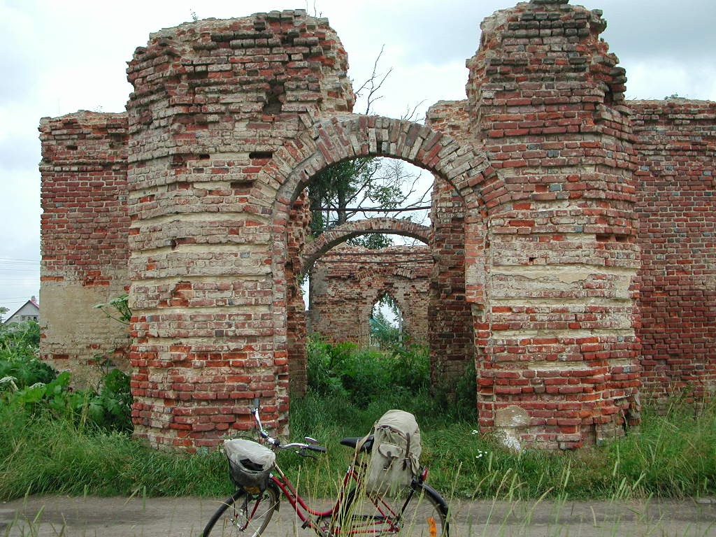 Петропавловская церковь (Санкт-Петербург и Лен.область, Волосово, деревня Клопицы)